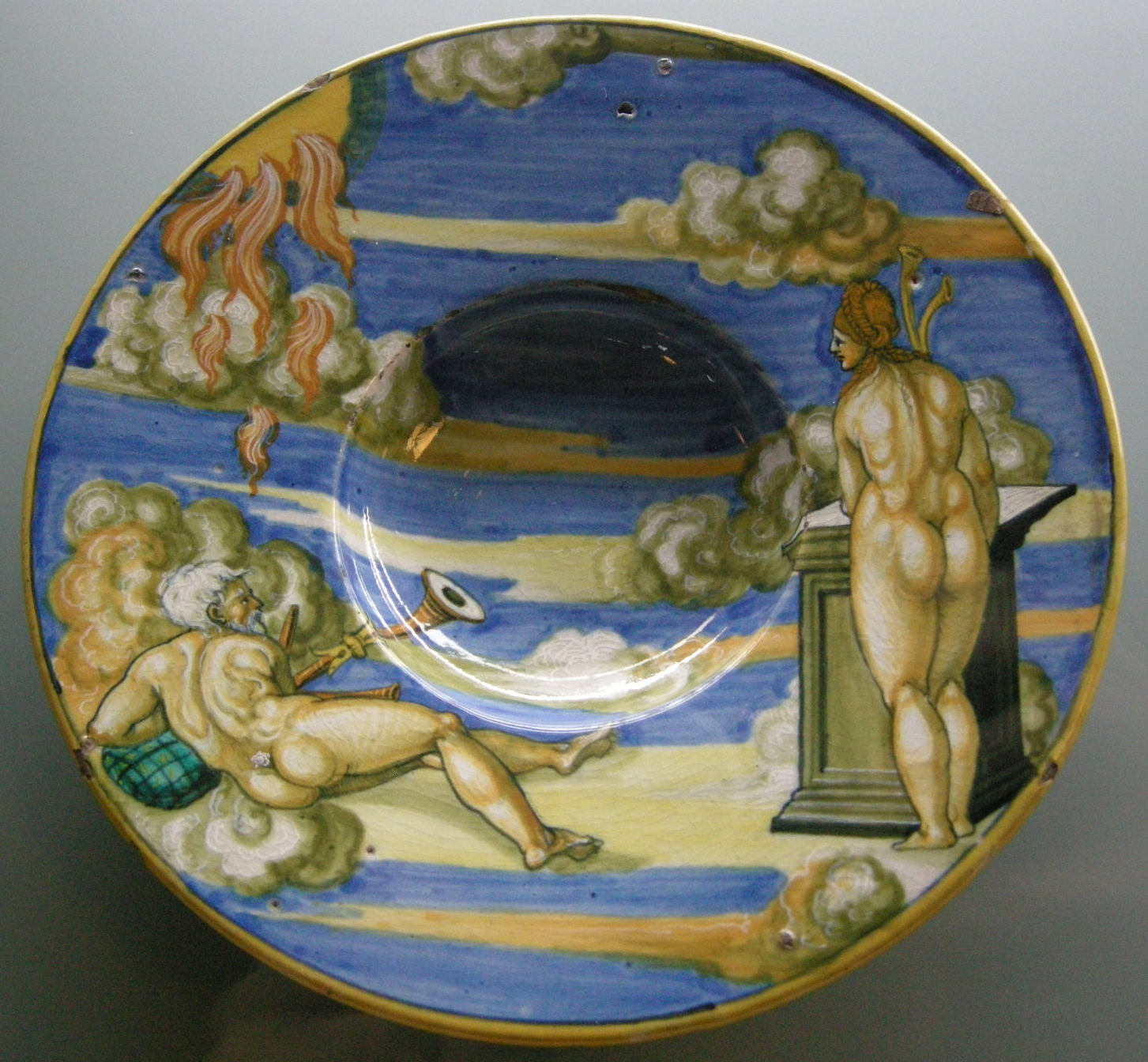 C.sf., urbino, francesco xanto avelli, tondino con allegoria del nuovo anno, 1530